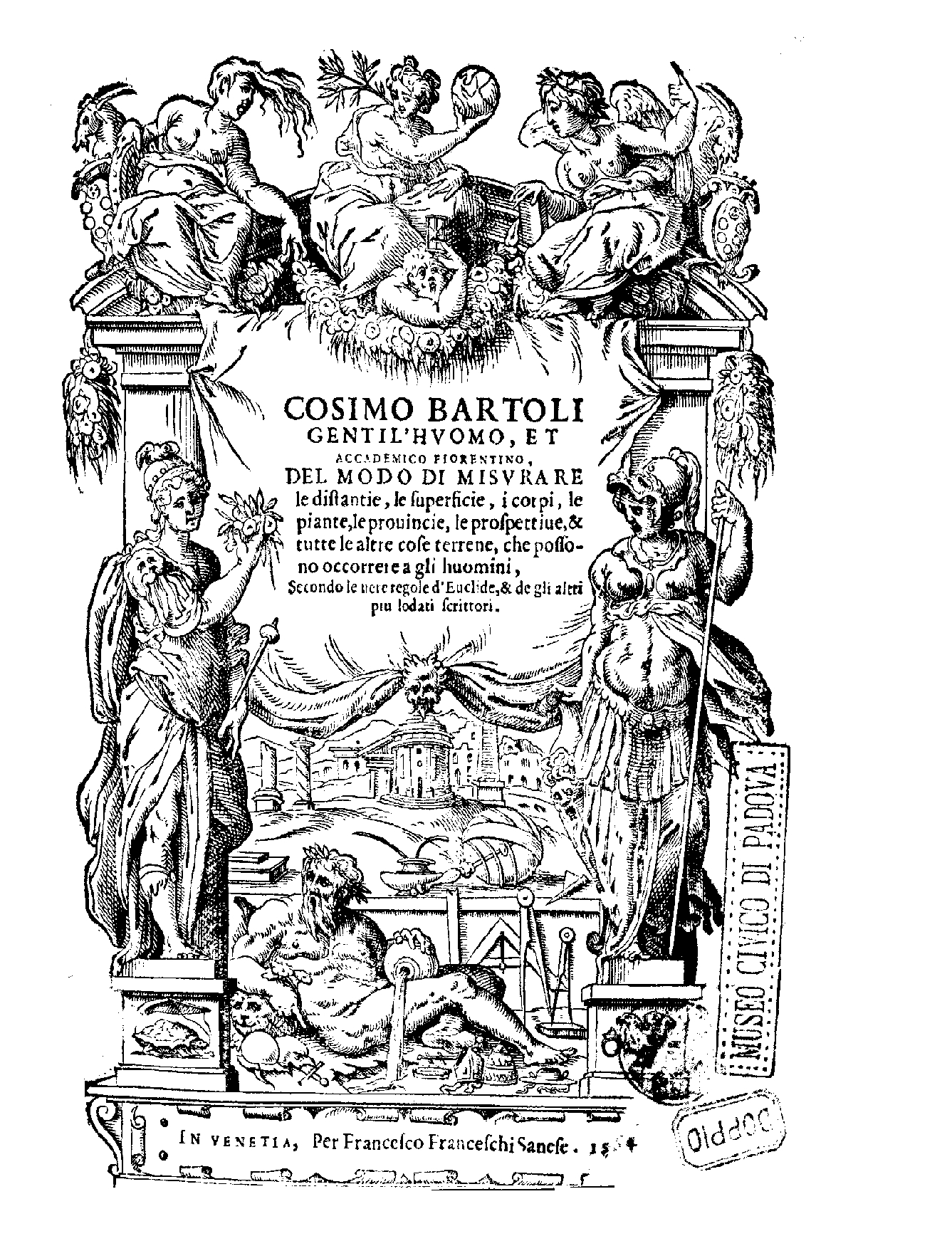 Cosimo Bartoli ... Del modo di misurare le distantie, le superficie, i corpi, le piante, le prouincie, le prospettiue, & tutte le altre cose terrene, che possono occorrere a gli huomini, secondo le uere regole d'Euclide, & de gli altri piu lodati scrittori. - In Venetia : per Francesco Franceschi Sanese, 1564 (In Venetia : per Francesco Franceschi Sanese, 1564). - [4], 141, [3] c., [2] c. di tav. : ill. ; 4º .